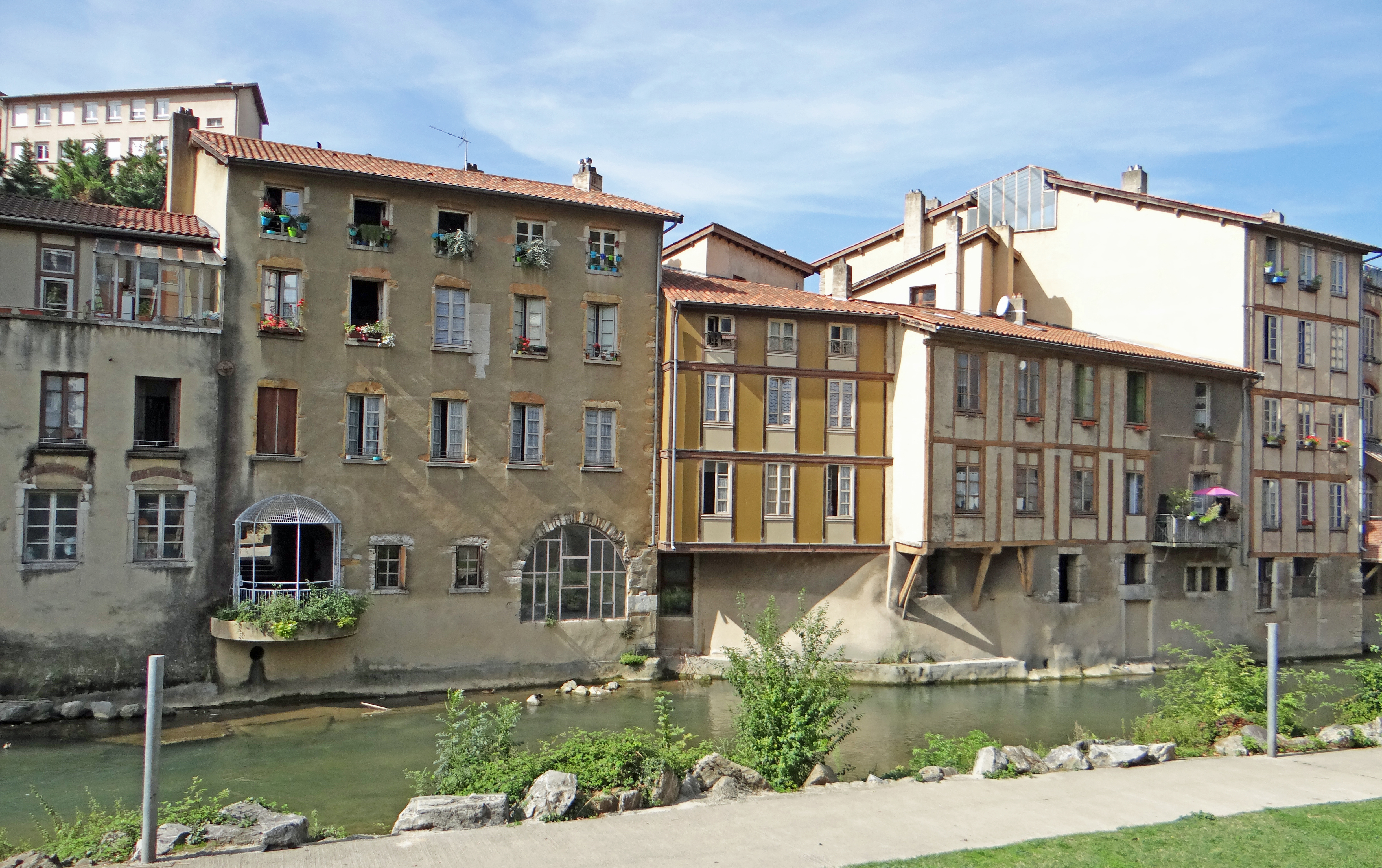 Vienne (Isère) - Les rives de la Gère : Rive gauche, à l'aval du pont Saint-Martin